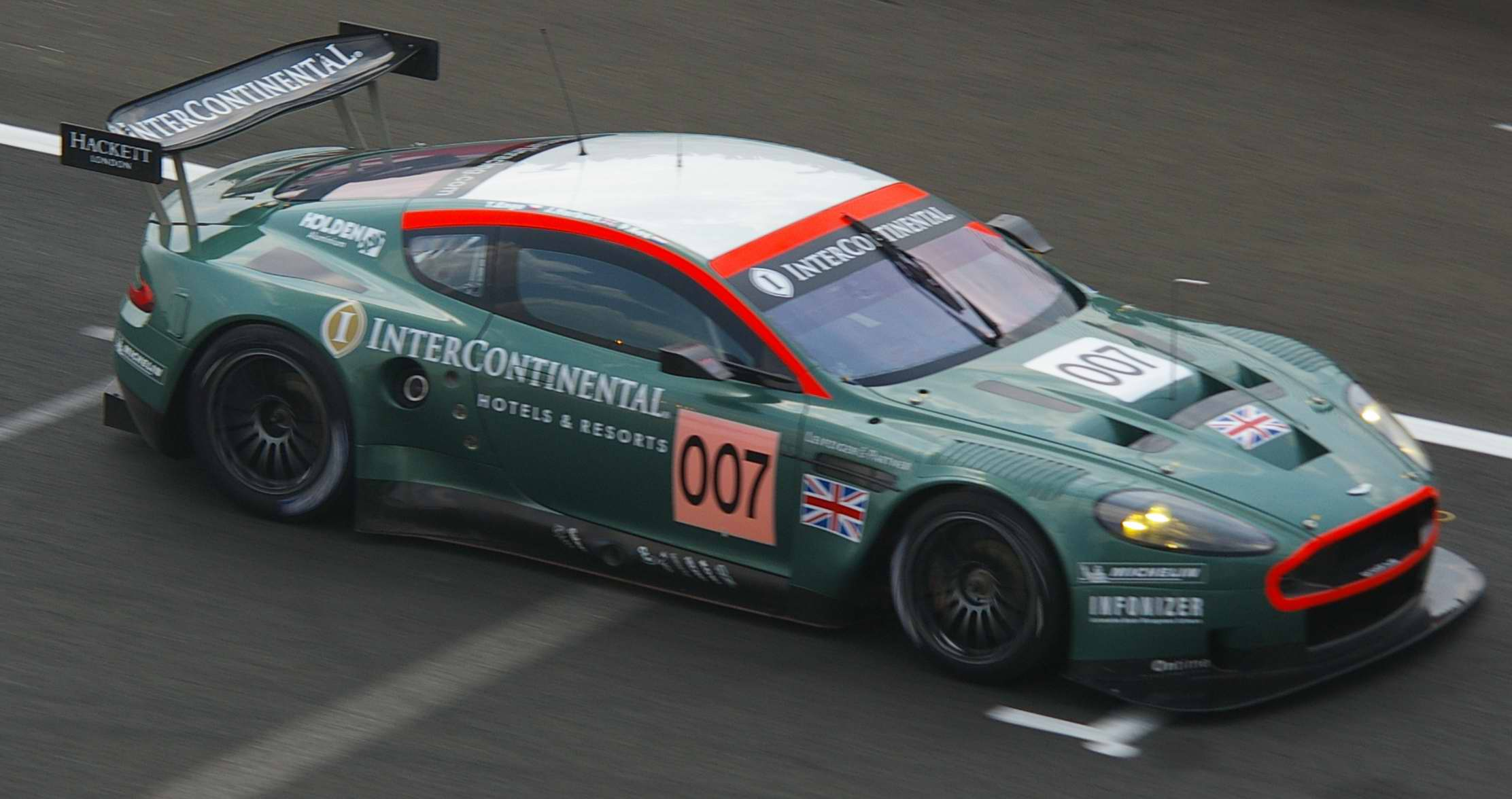 Ligne droite des stands - Aston Martin DBR9 de l'équipage 007 (Tomas Enge, Johnny Herbert et Peter Kox) lors de la journée test des 24h du Mans du 03 juin 2007.